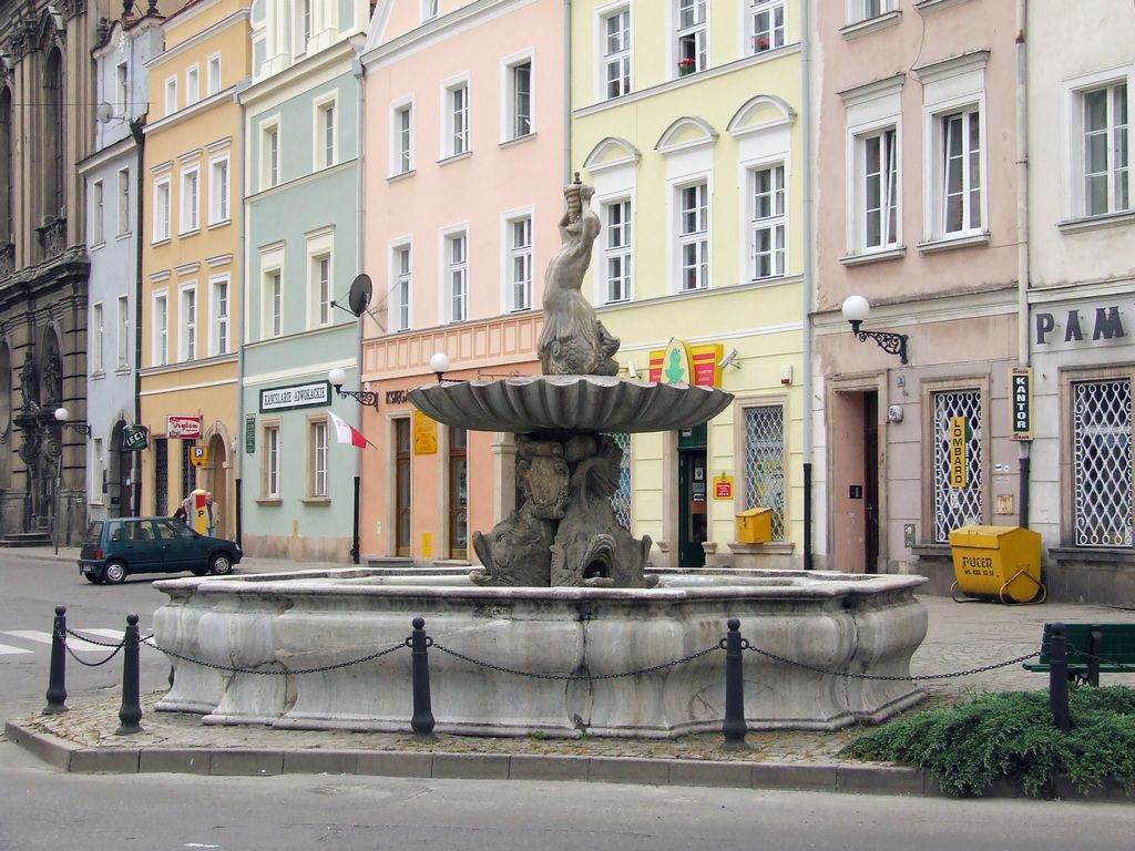 Fontanna Trytona widok z Rynku